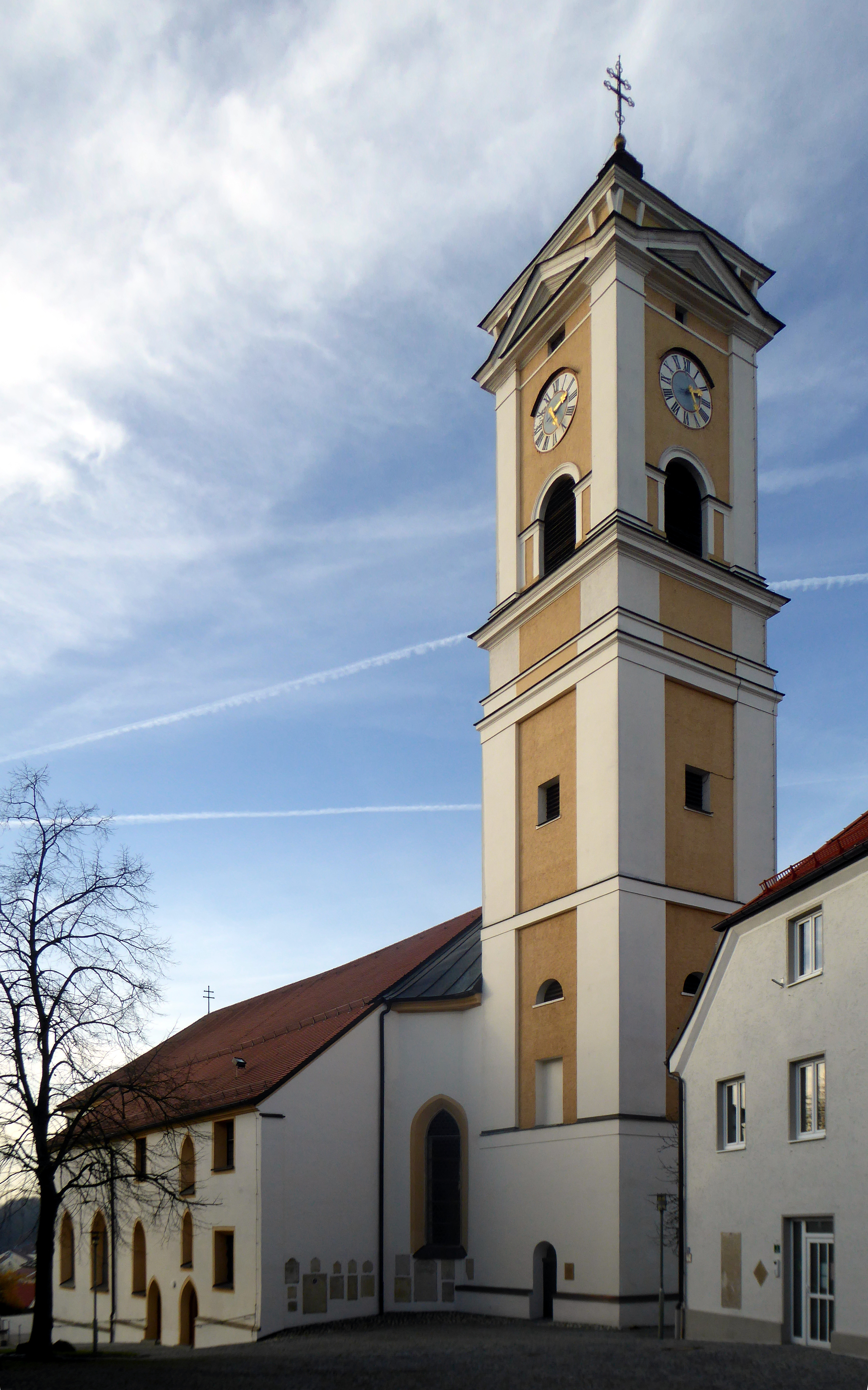 Bad Birnbach, Pfarrkirche von Osten.